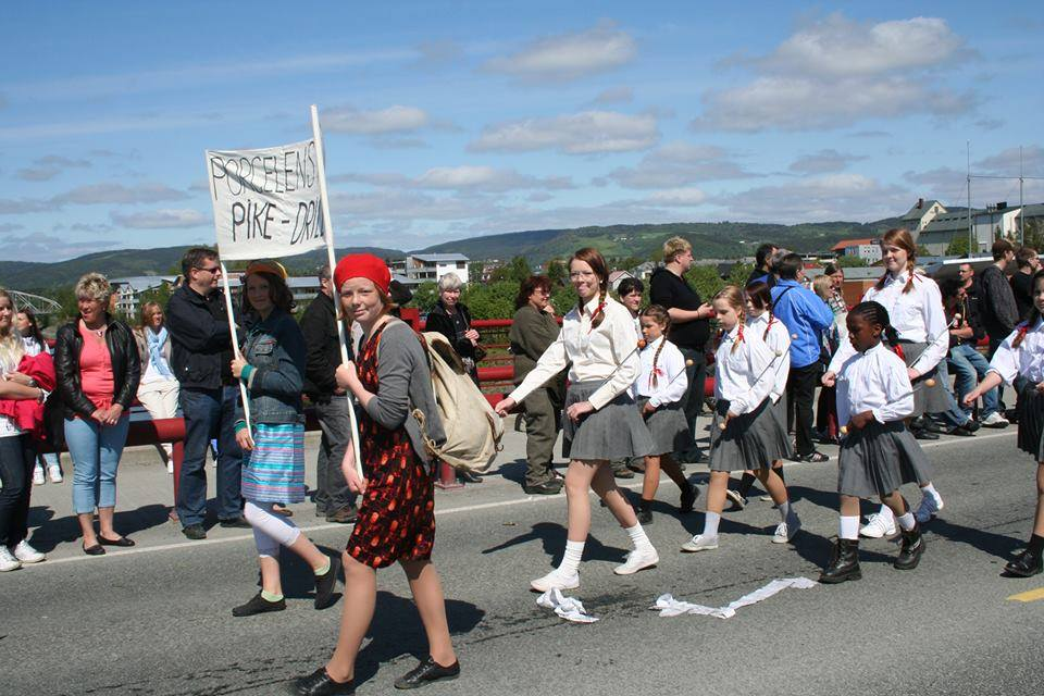 Toget under vømmølfestivalen